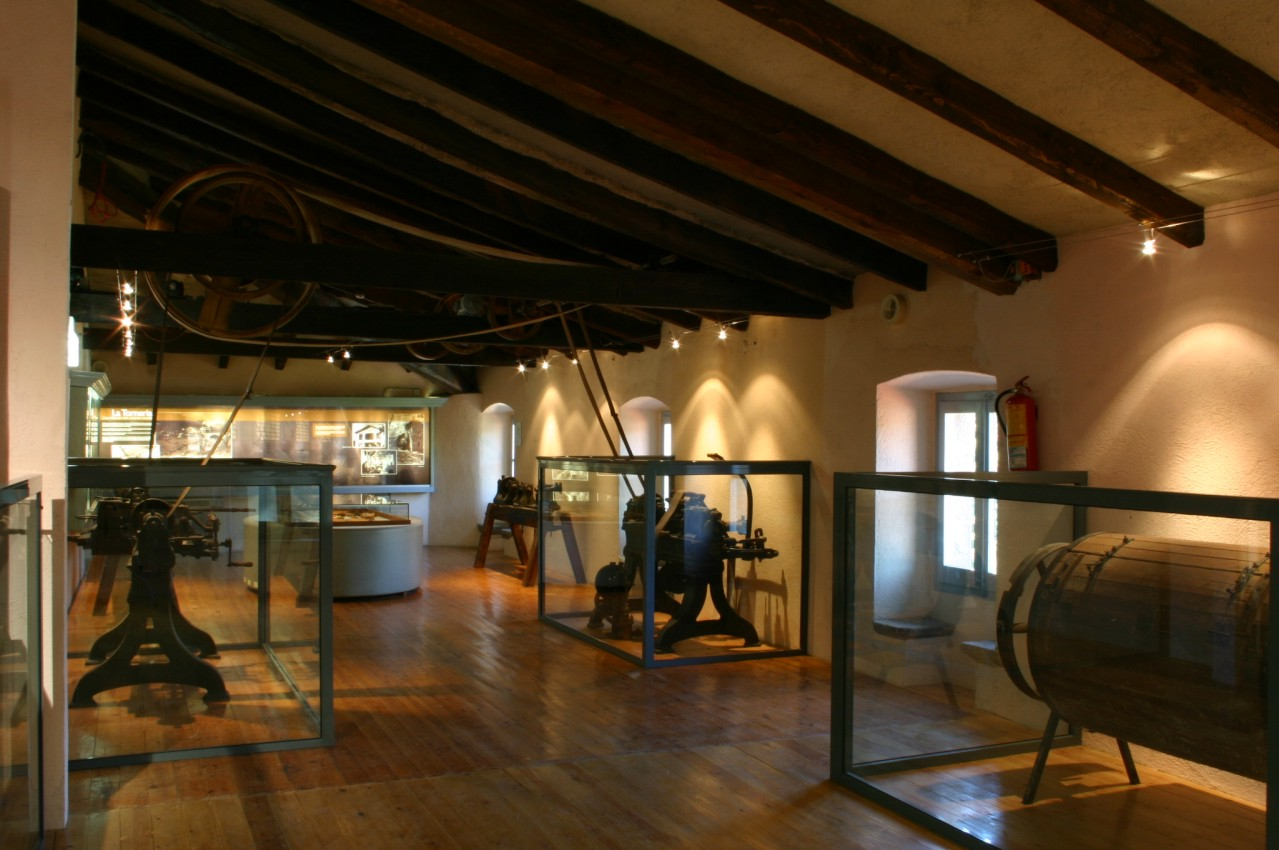 Museu etnològic del Montseny